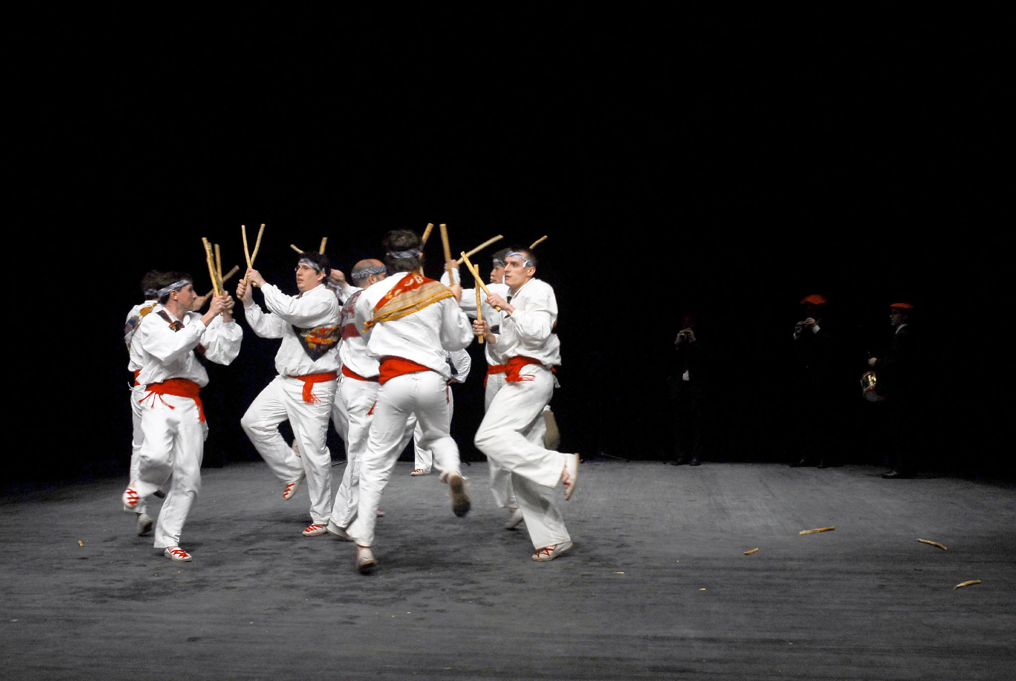 Basque men performing a folk dance